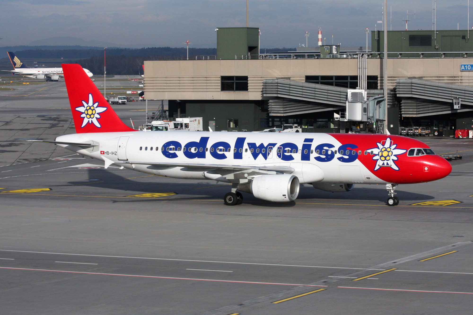 Zürich (- Kloten) (ZRH / LSZH) Switzerland 12.2013